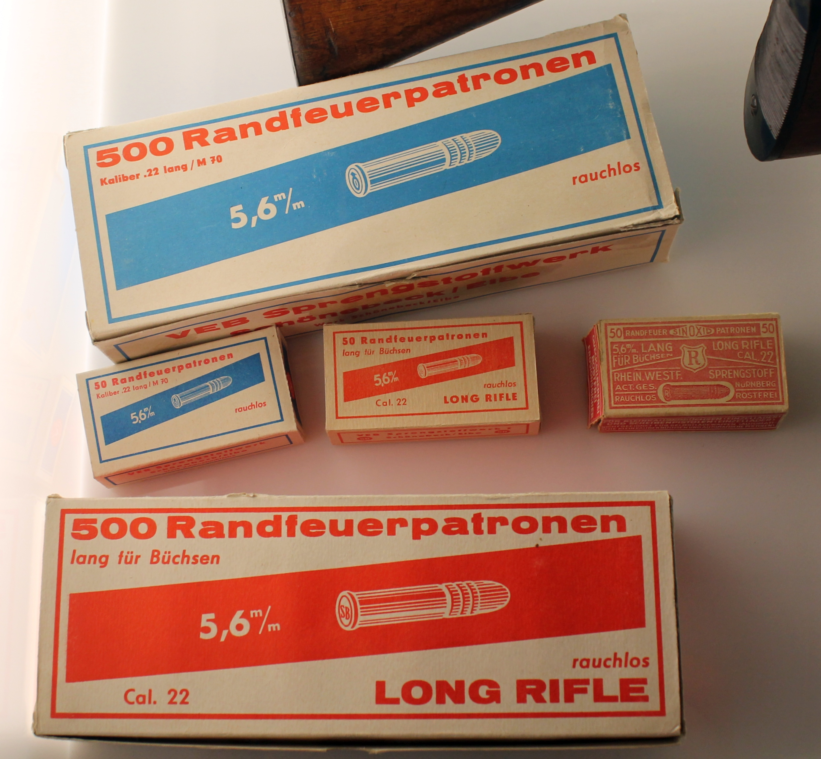 Kleinkaliberpatronen .22lfB (5,6 x 15,5 mm R) im Waffenmuseum Suhl. Packung mit 50 Stück, VEB Sprengstoffwerk Schönebeck/Elbe.